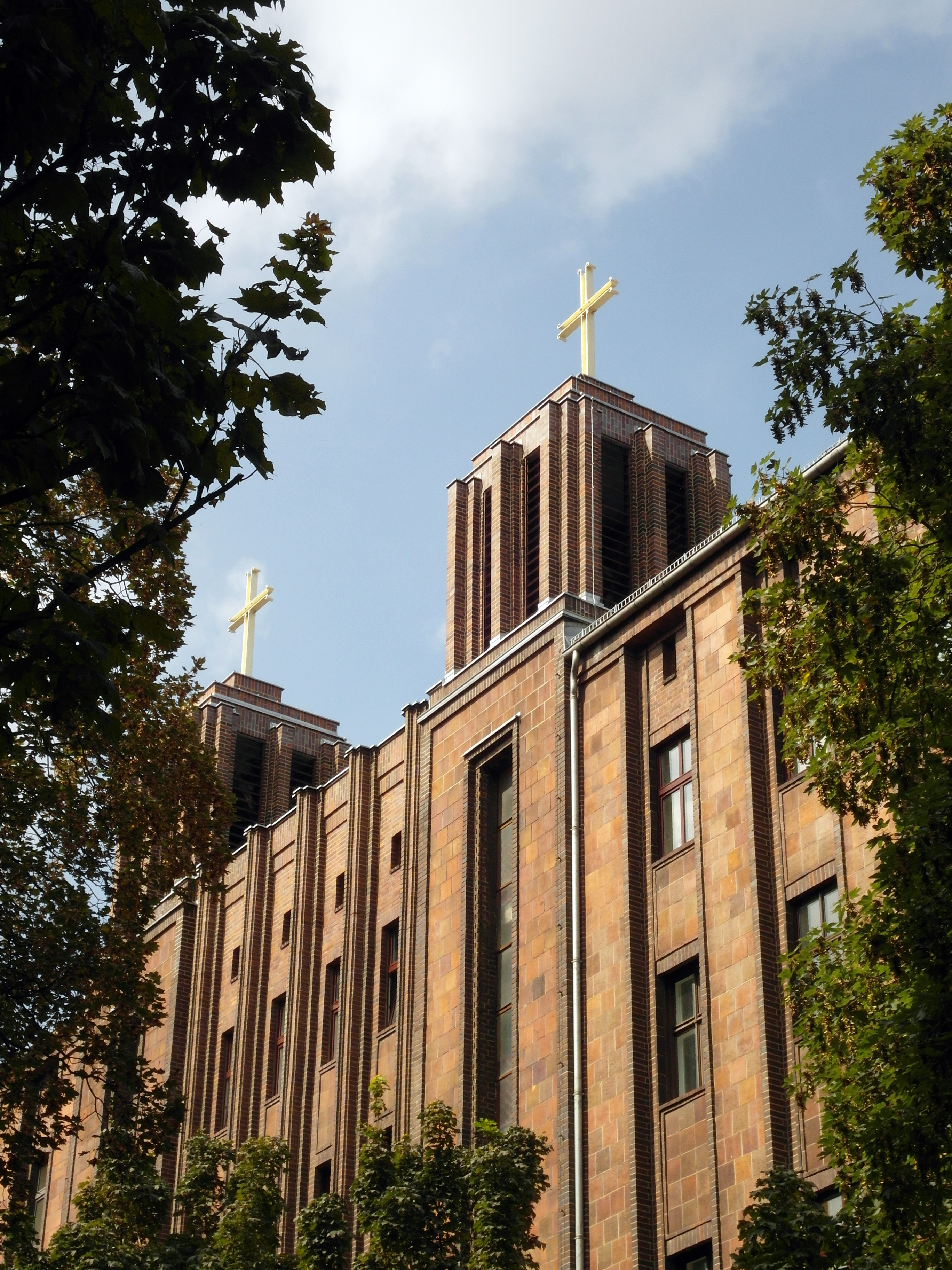 Frontansicht der Bekenntniskirche in Berlin-Alt-Treptow